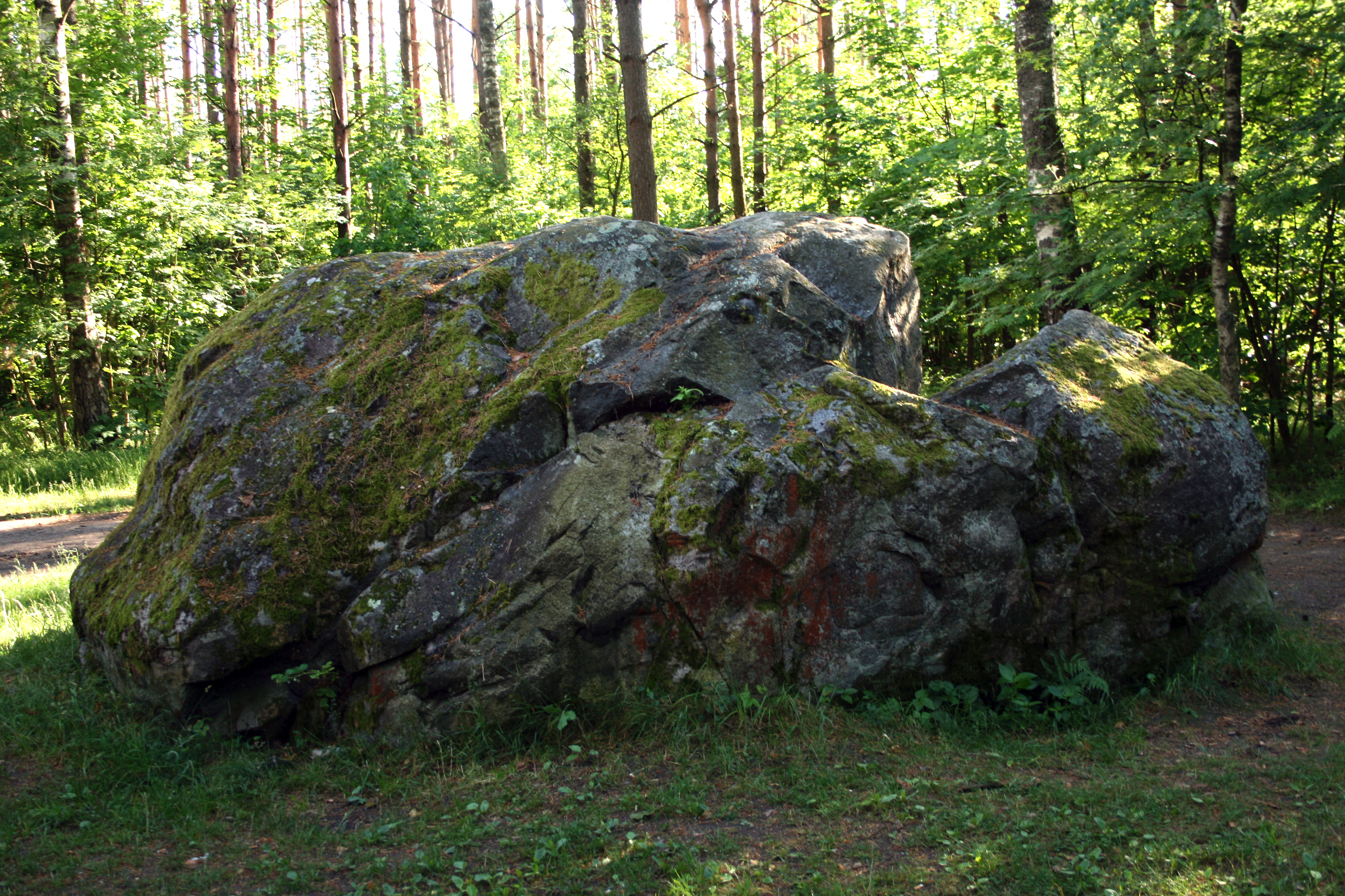 Geidžių akmuo arba Akmuo trobelė pirtelė, Didysis, Pirtelė, Trobelė - riedulys Mažeikių rajone, Tirkšlių seniūnijoje, netoli Geidžių kaimo.